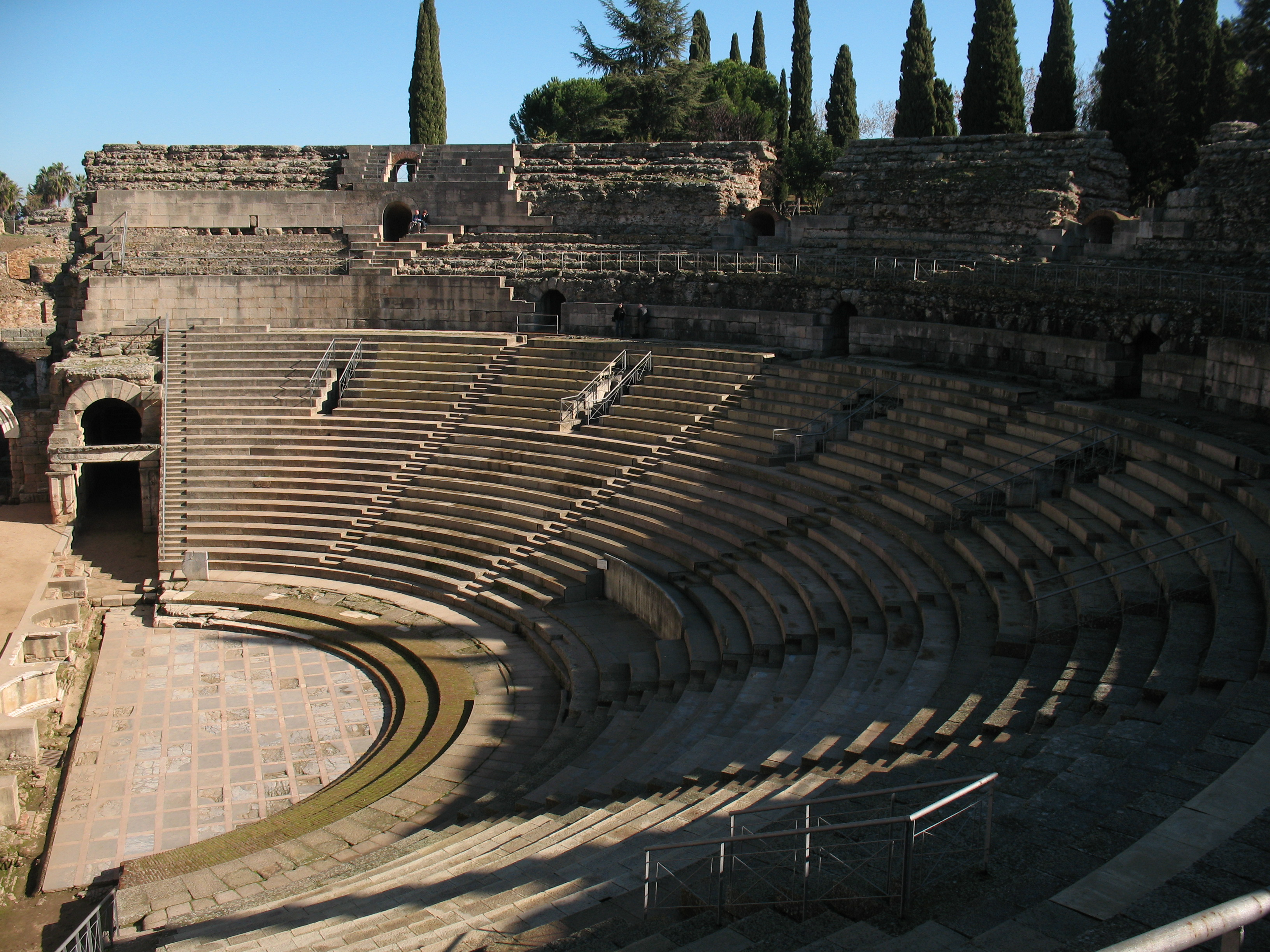 Graderío del Teatro Romano de Mérida (España)